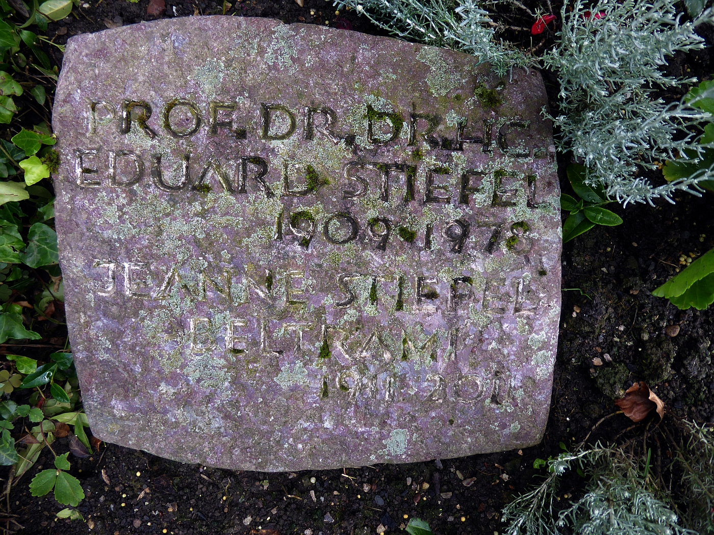 Eduard Stiefel (1909–1978) Mathematiker. Grab auf dem Friedhof Witikon, Zürich